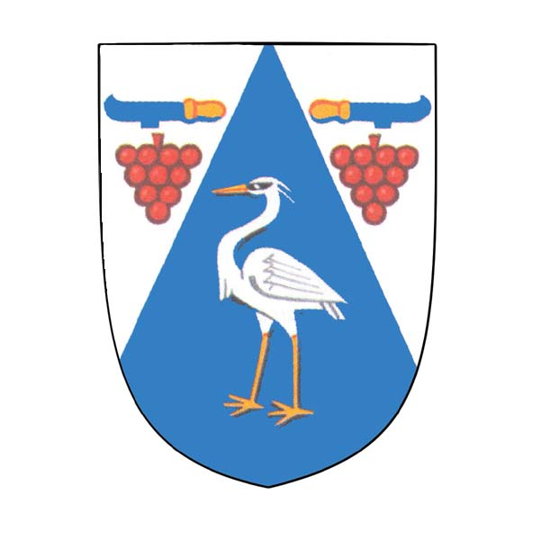 Znak obce Branišovice